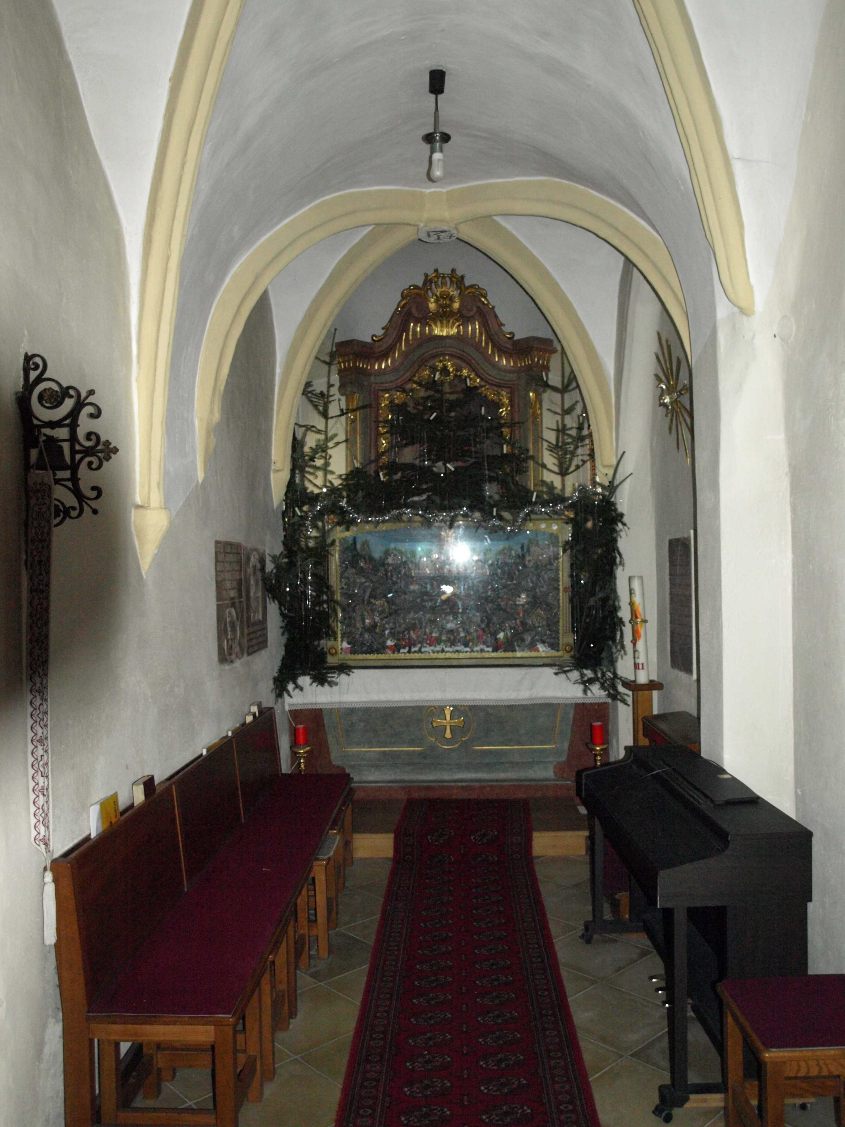 Kath. Pfarrkirche hl. Ruprecht